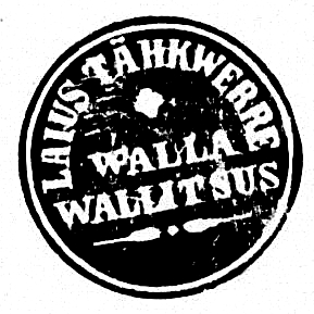 Laius-Tähkvere vallavalitsuse pitsat. Üleslaadija koopia ja töötlus